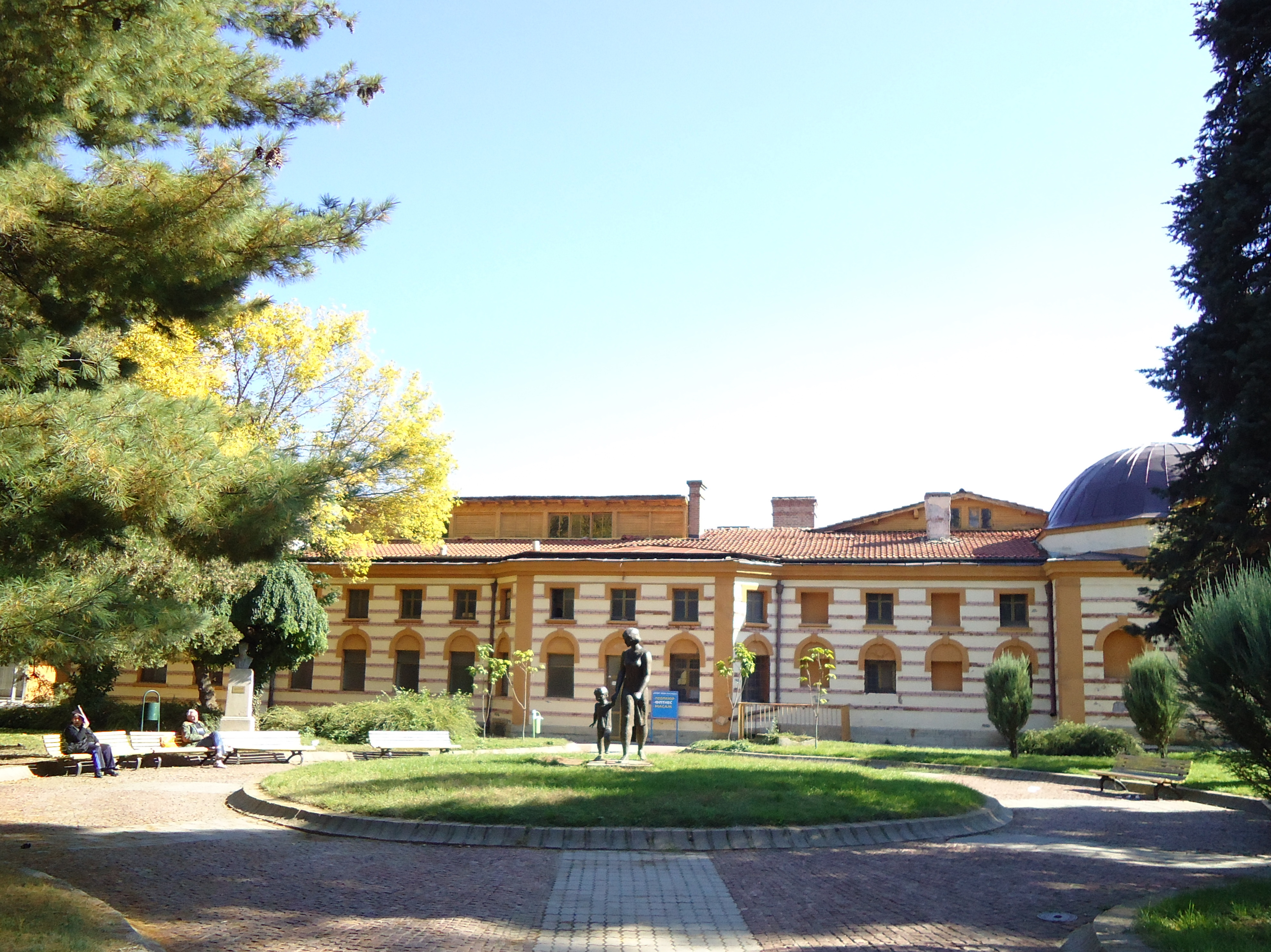 Чифте баня - Кюстендил